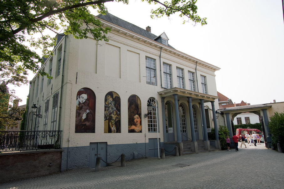 Arentshuis, Brugge